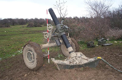 Mortaio rigato da 120 mm, Esercito italiano